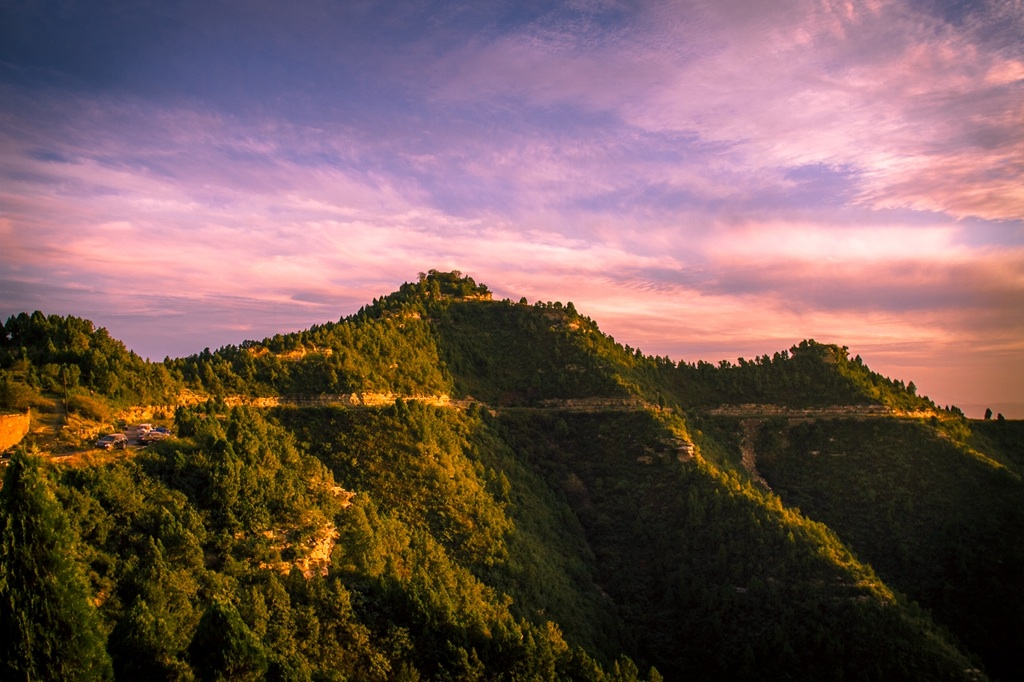 黄昏时所摄。